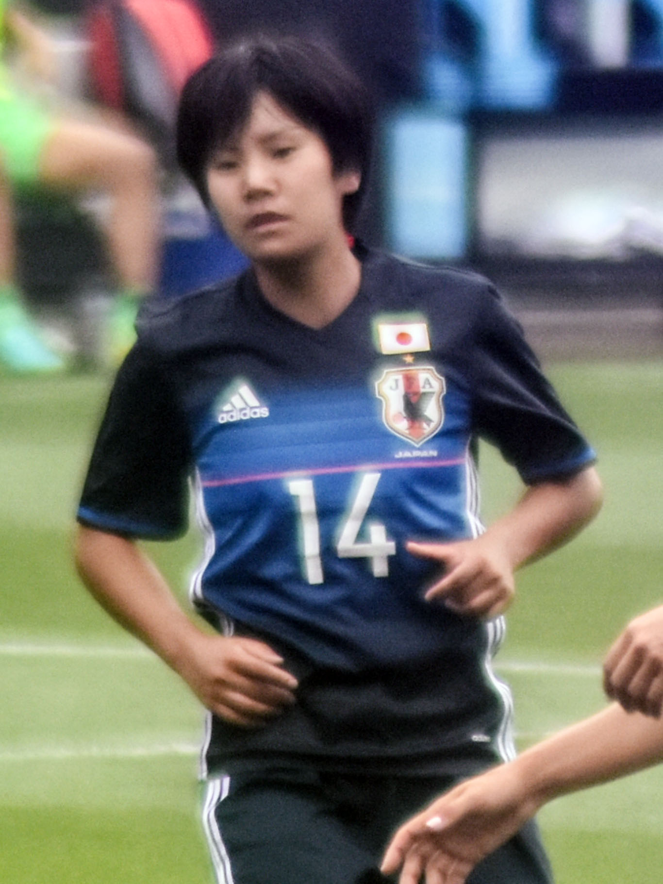 From Flickr user edrost88, match details here